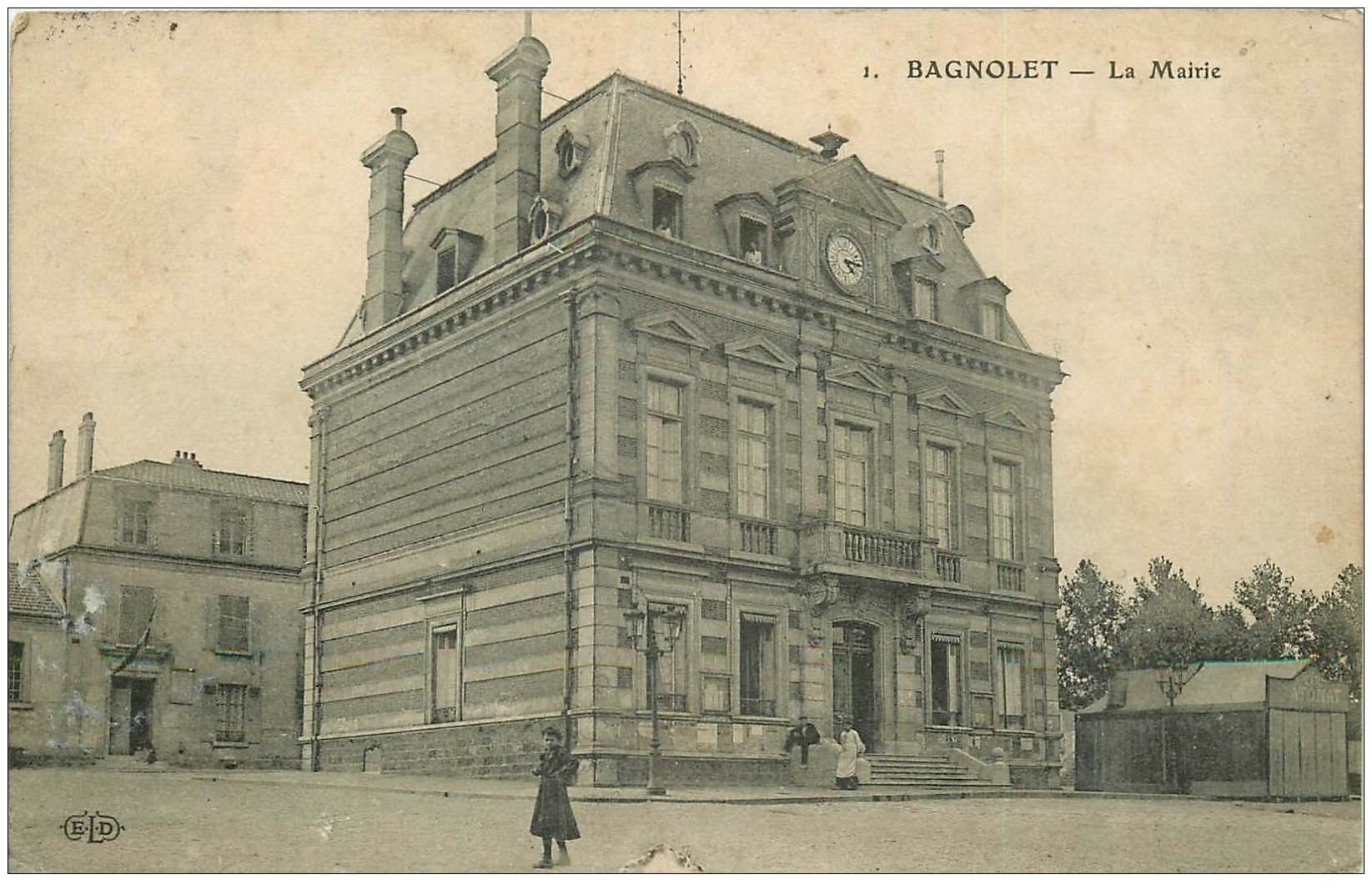 Photo place de la mairie vers 1918